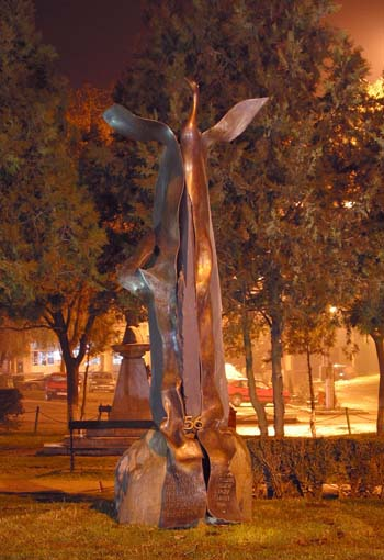 Kategória:1956-os forradalom